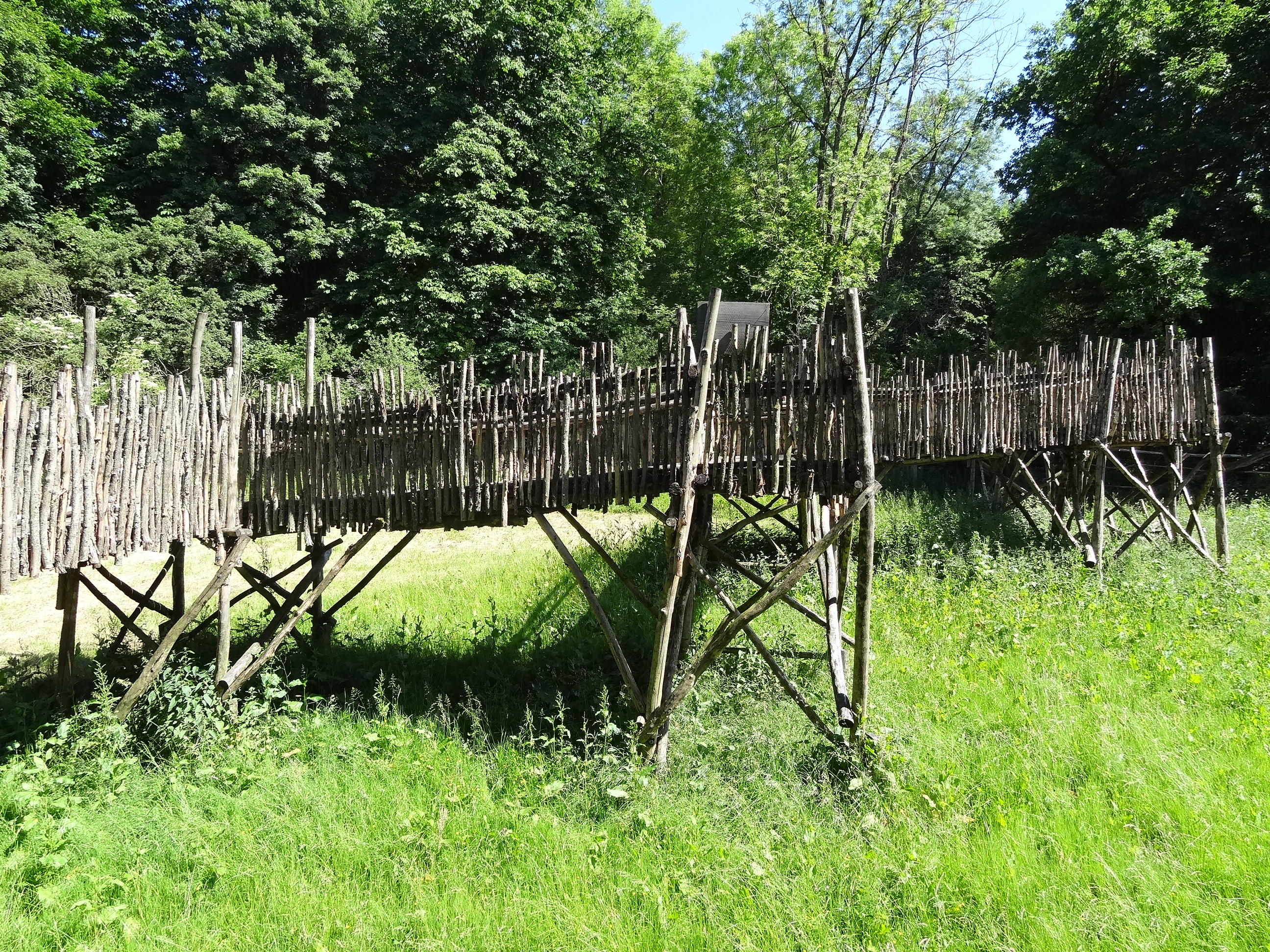 Grünes Meer